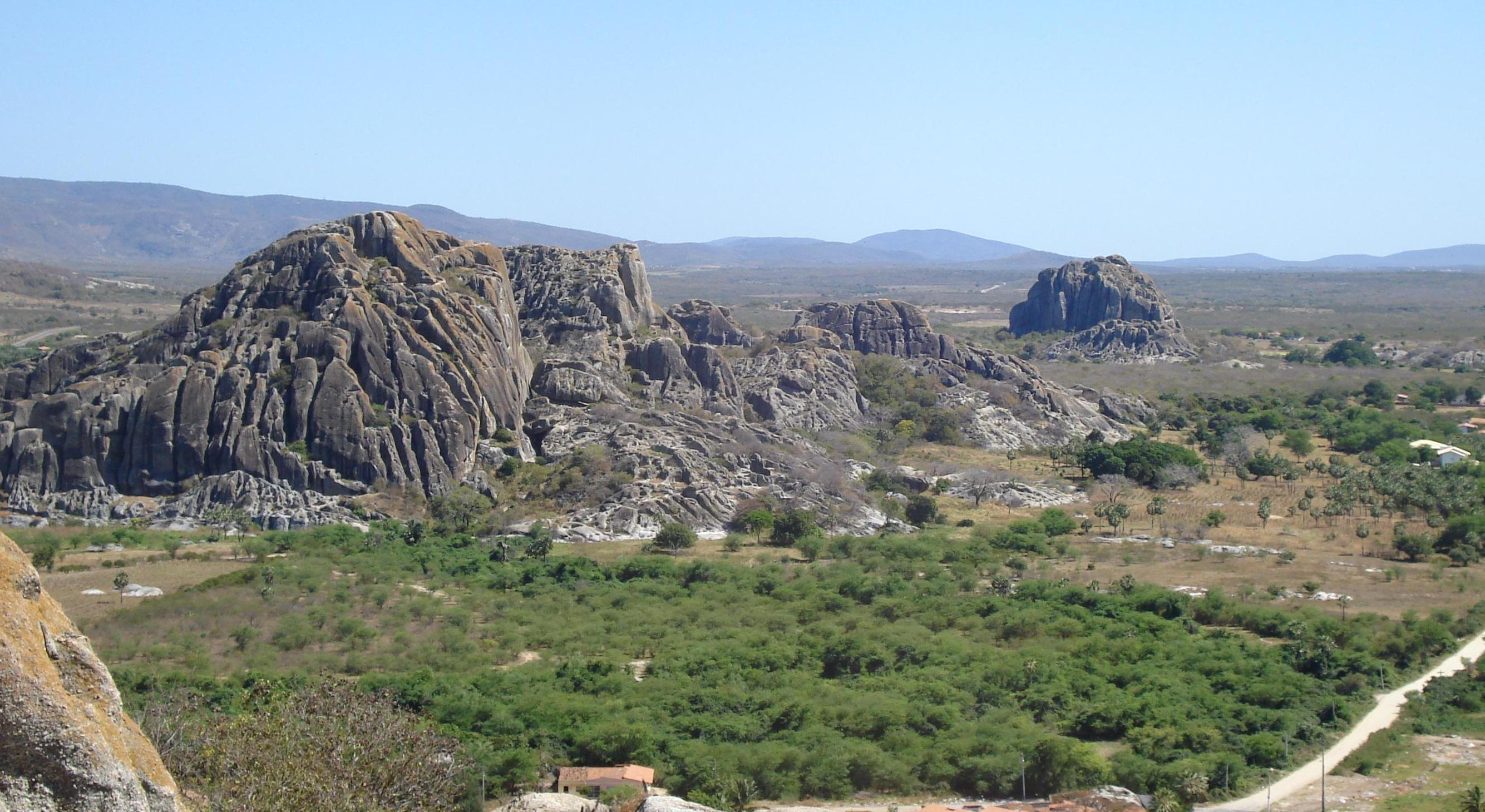 Monólitos localizados nos arredores de Quixadá - CE, Brasil.